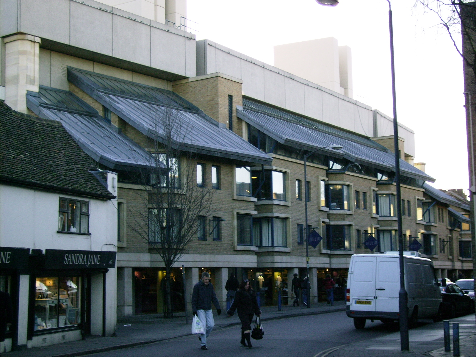 no description